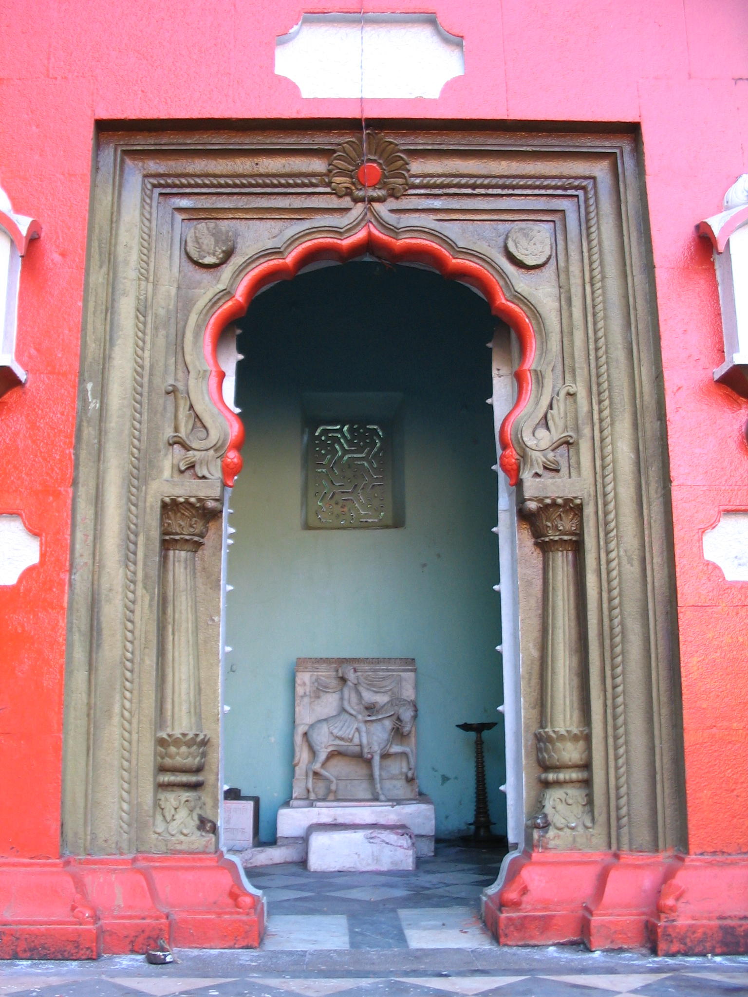 Panhala fort